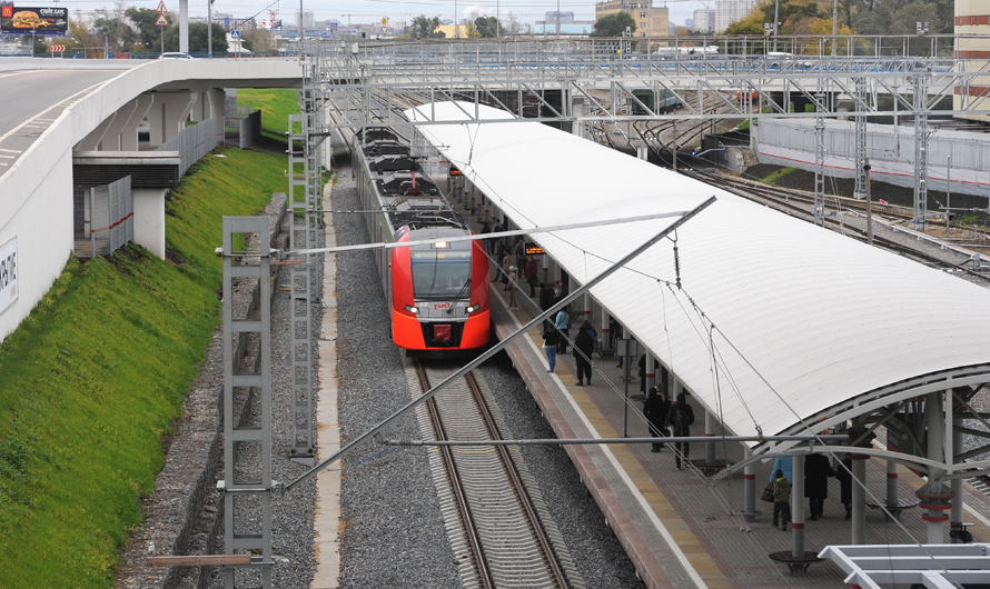 Платформа МЦК Дубровка, вид с пешеходного моста. К платформе прибывает электропоезд ЭС2Г